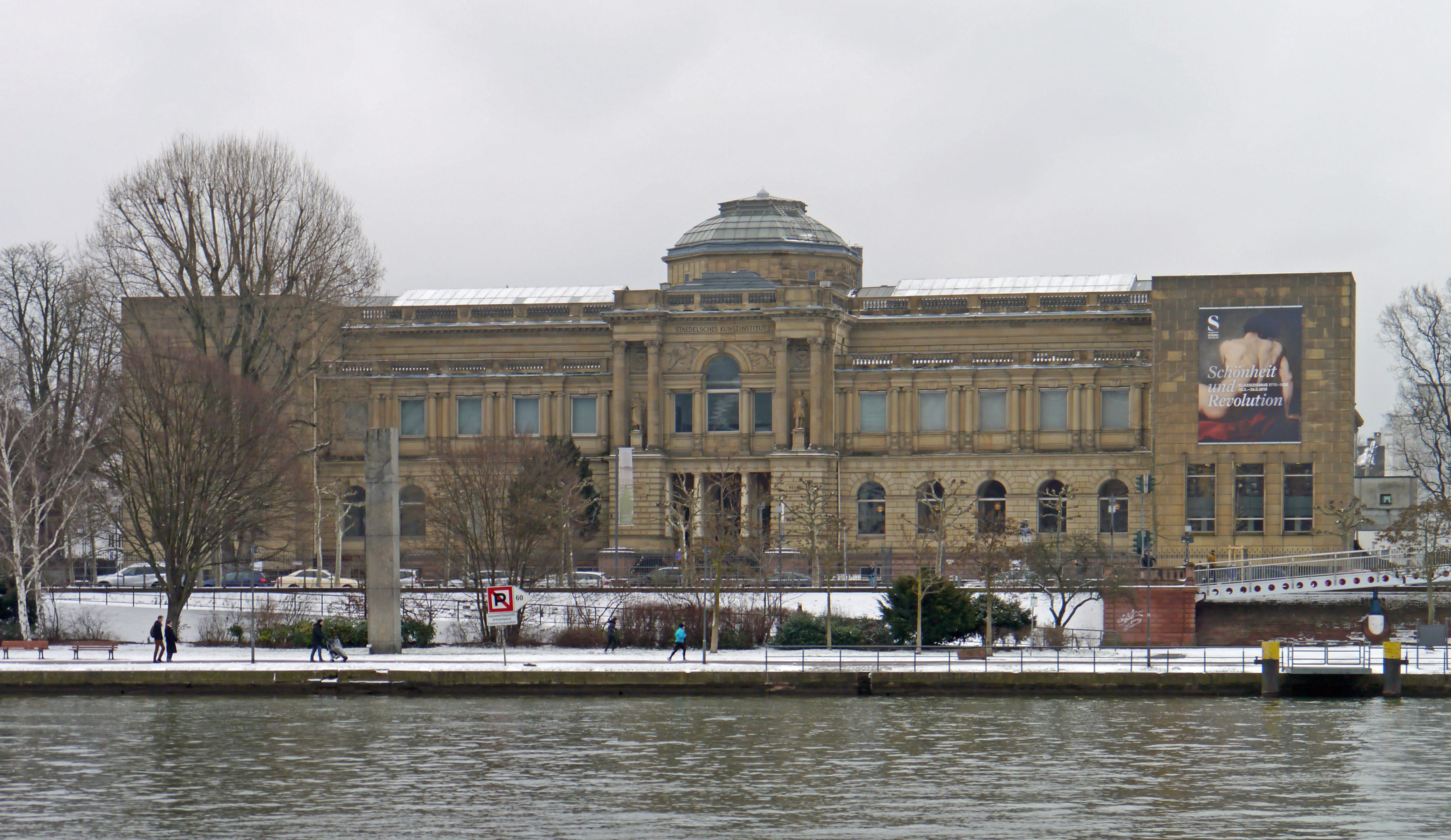 Das Städel in Frankfurt am Main.